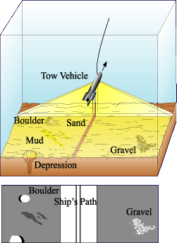 Sidescan sonar